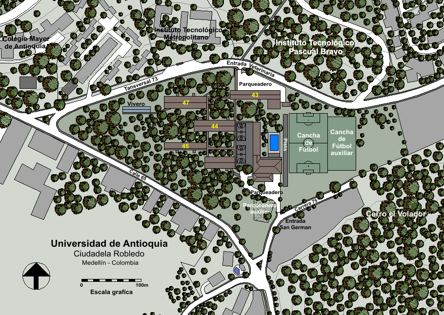 Plano de la Ciudadela Robledo de la Universidad de Antioquia, Medellín, Colombia. (Realice el plano calcándolo de un mapa poco detallado, por esta razón el plano no es 100% exacto en medidas pero la distribución y volumetría concuerdan con la forma y el diseño urbano del campus, la escala gráfica es sacada intuitivamente. Si contiene algún error favor notifíquelo en mi página de usuario, en la sección discusión.)